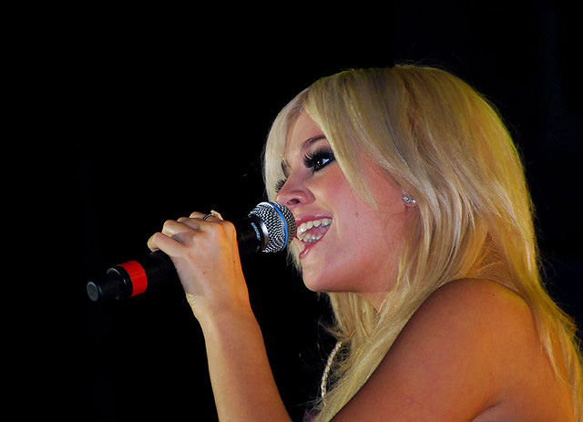 Cantora inglesa Pixie Lott apresentando-se em 2009 na cidade italiana de Roma.